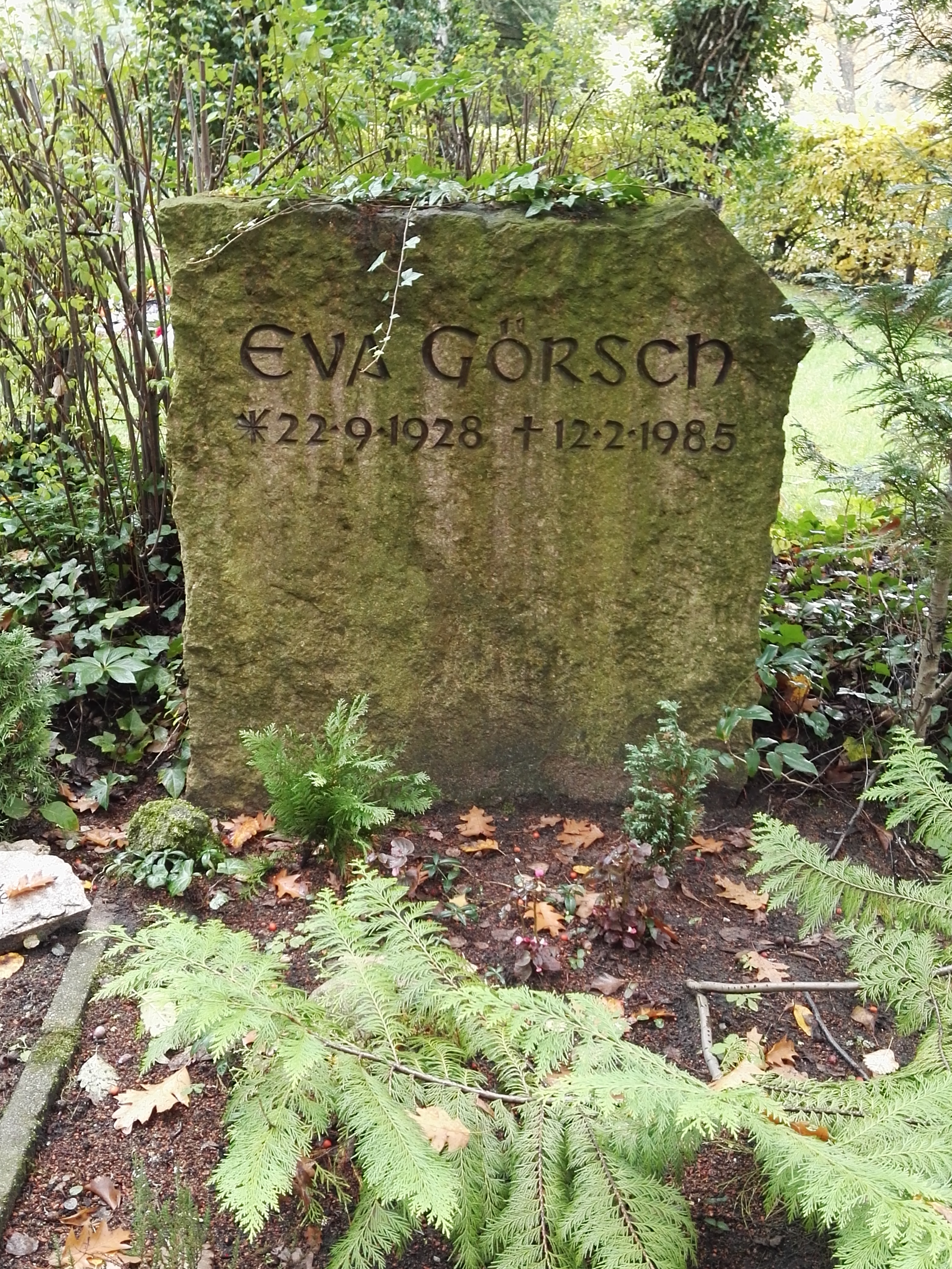 Grab von Eva Görsch auf dem Zentralfriedhof Friedrichsfelde